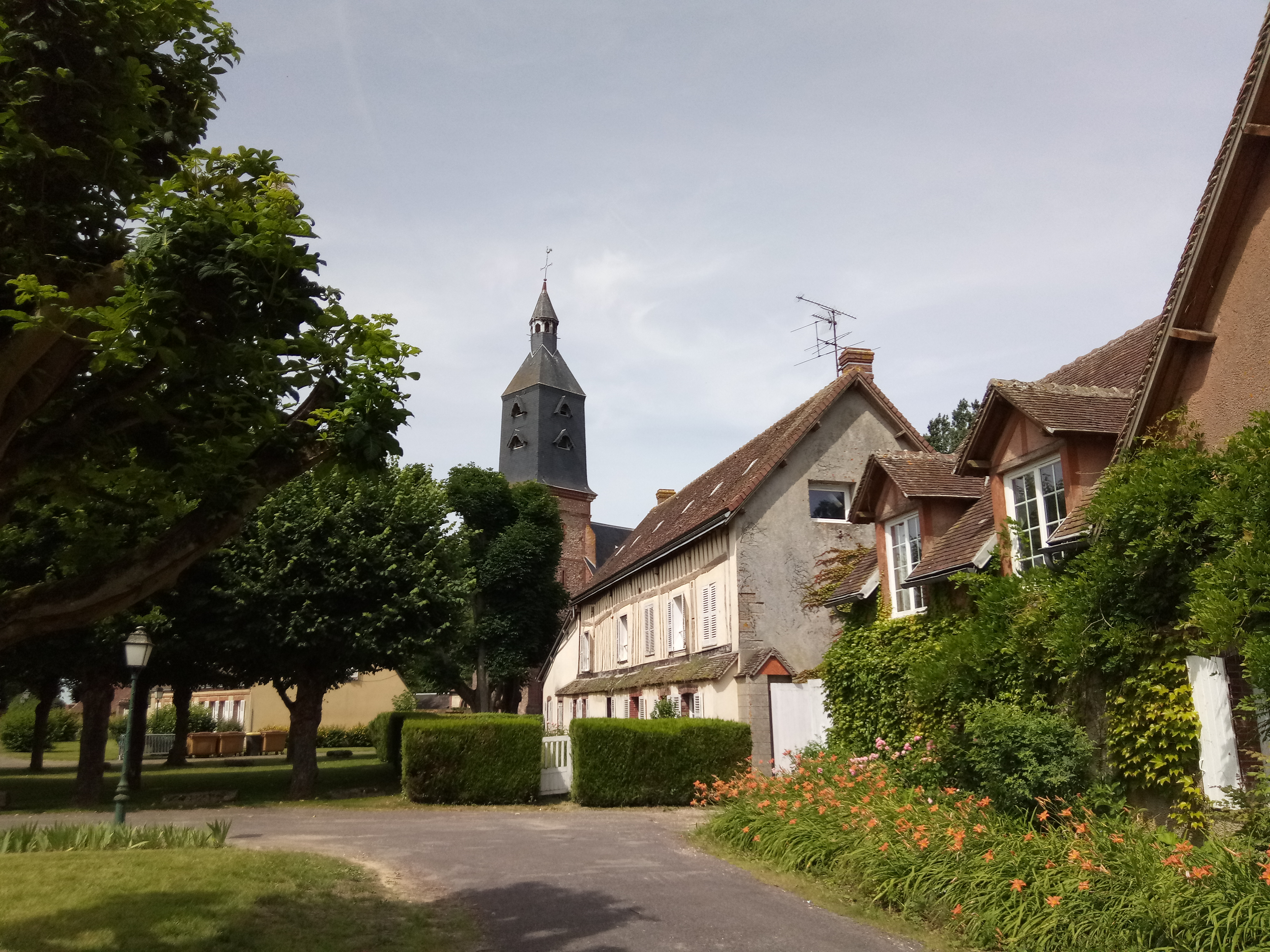 Place de l'église à Tremblay-Le-Vicomte